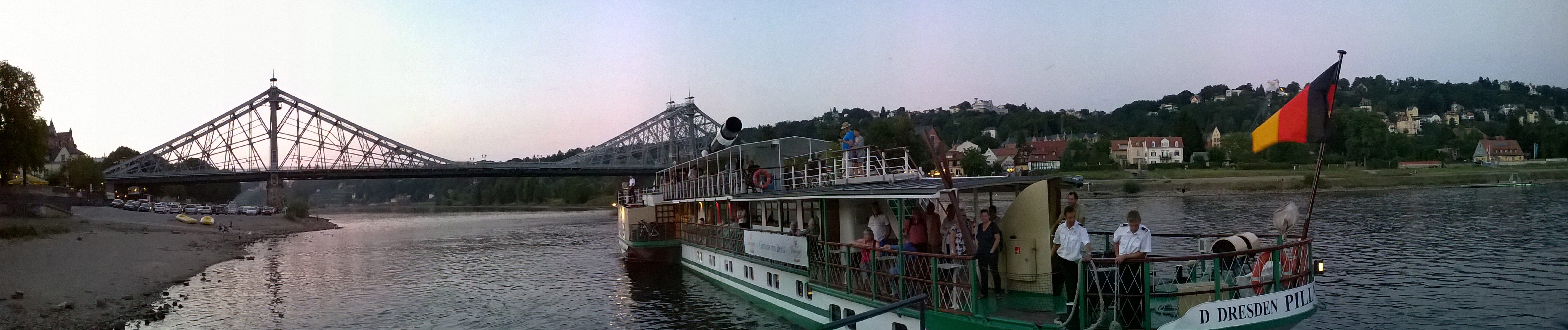 + 00000000007_Panorama_Image_Blaues Wunder_in_Dresden_Sachsen_Germany